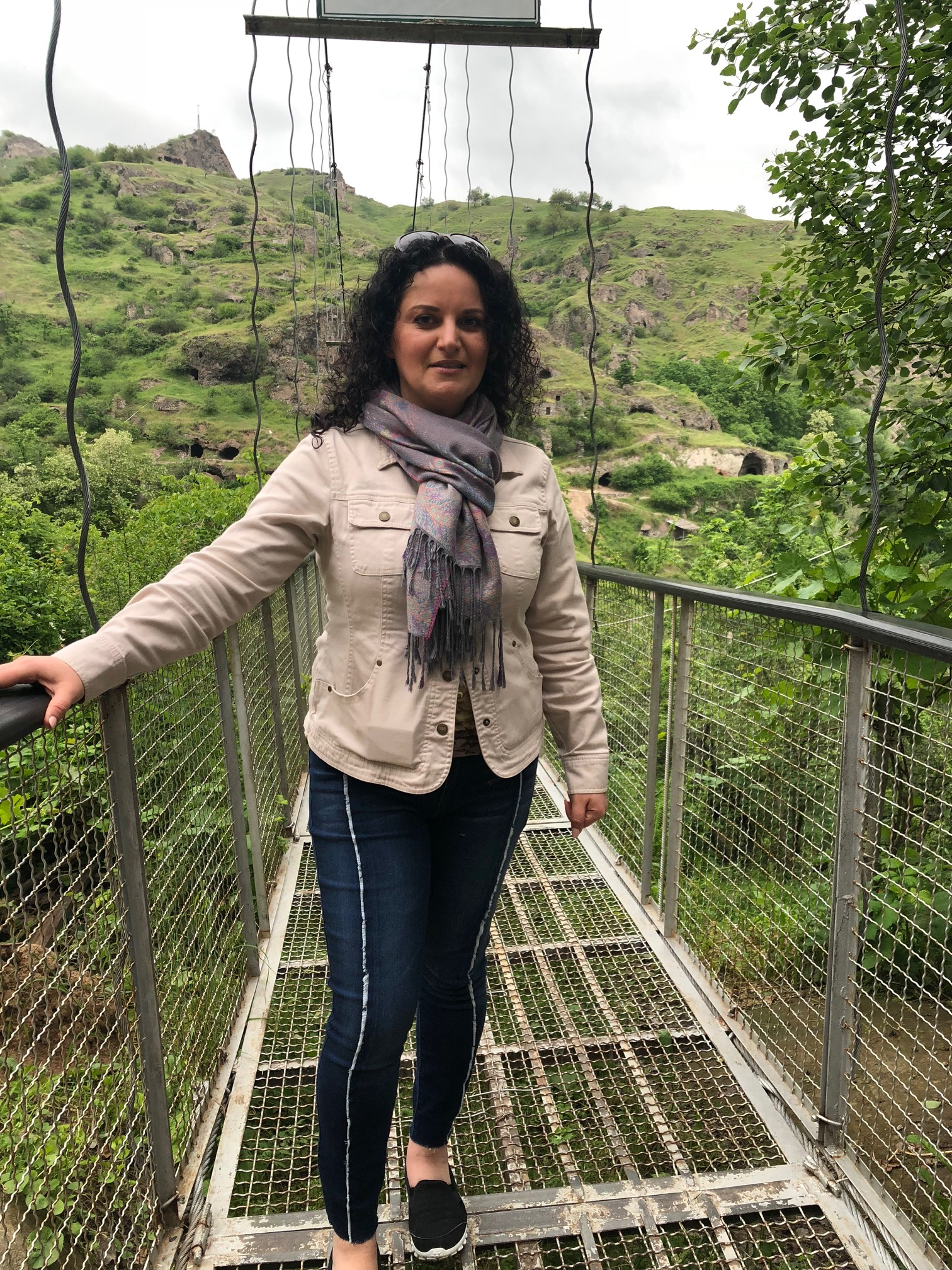 Աննա Աստվածատուրյան Թերքոթը Հին Խնձորեսկում